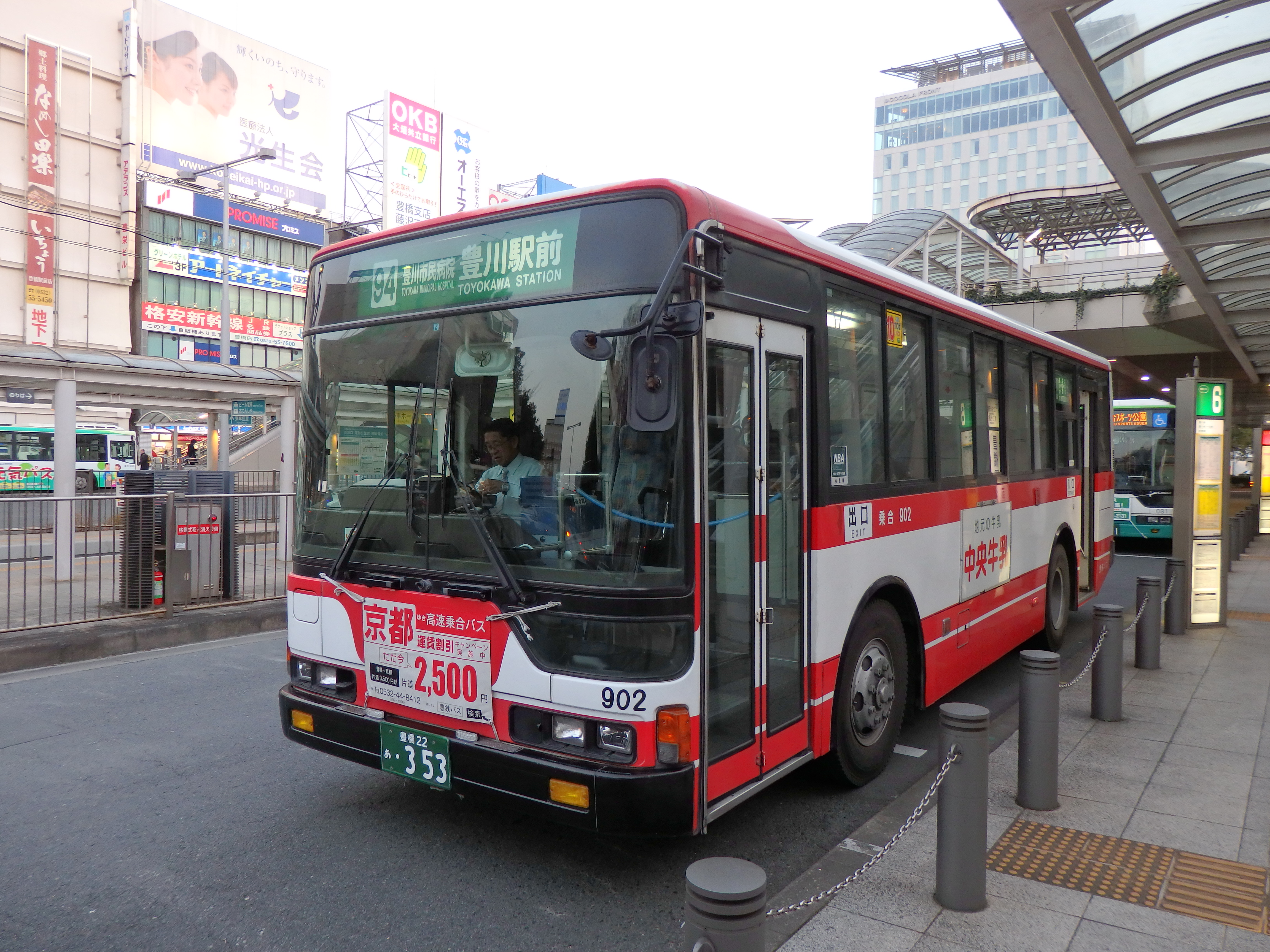 豊川線のエアロスターMM